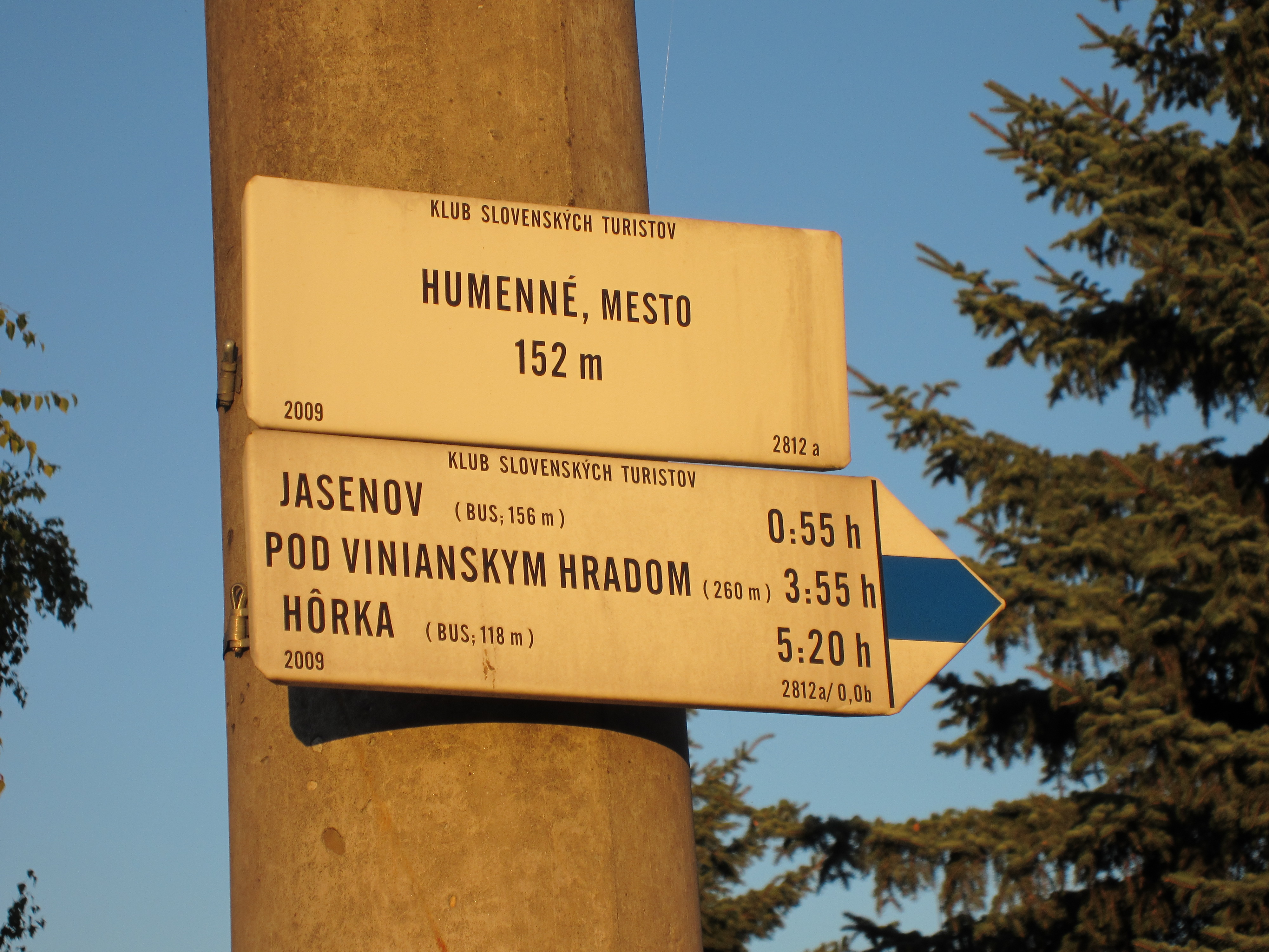 Turistická tabuľka a smerovka na železničnej stanici Humenné mesto, ktorá nasmeruje po modrej turistickej značke pod Viniansky hrad